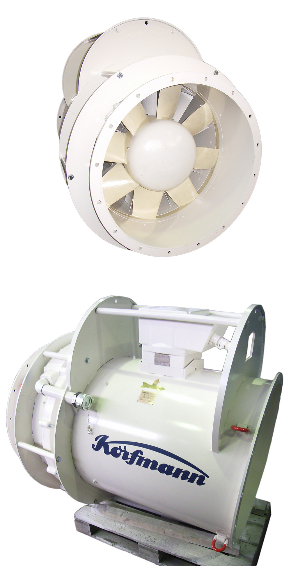 Großluefter mit 900 mm Durchmesser und 50 kW Antriebsleistung, Antrieb bei diesem Modell umschaltbar zwischen Druckluft und Drehstrommotor. Einsetzbar beispielsweise im Tunnelbau, Schachtbelueftungen. Groessenvergleich: Luefter gelagert auf Europalette (120cm)